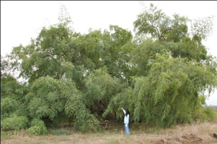 עץ שיזף בקיבוץ עין החורש